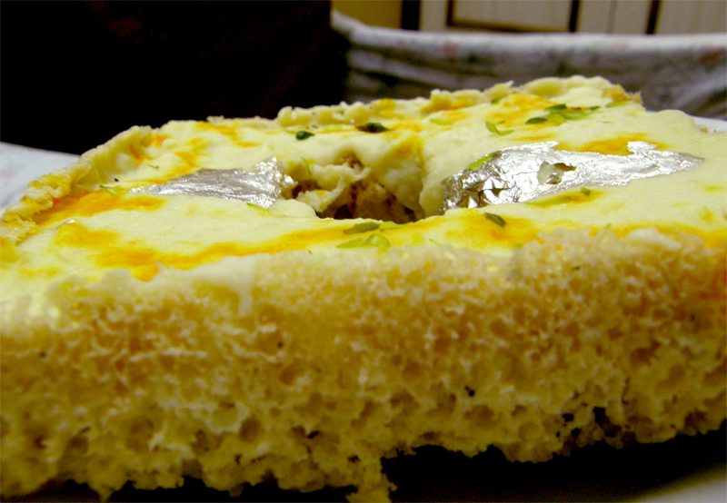 घेवर